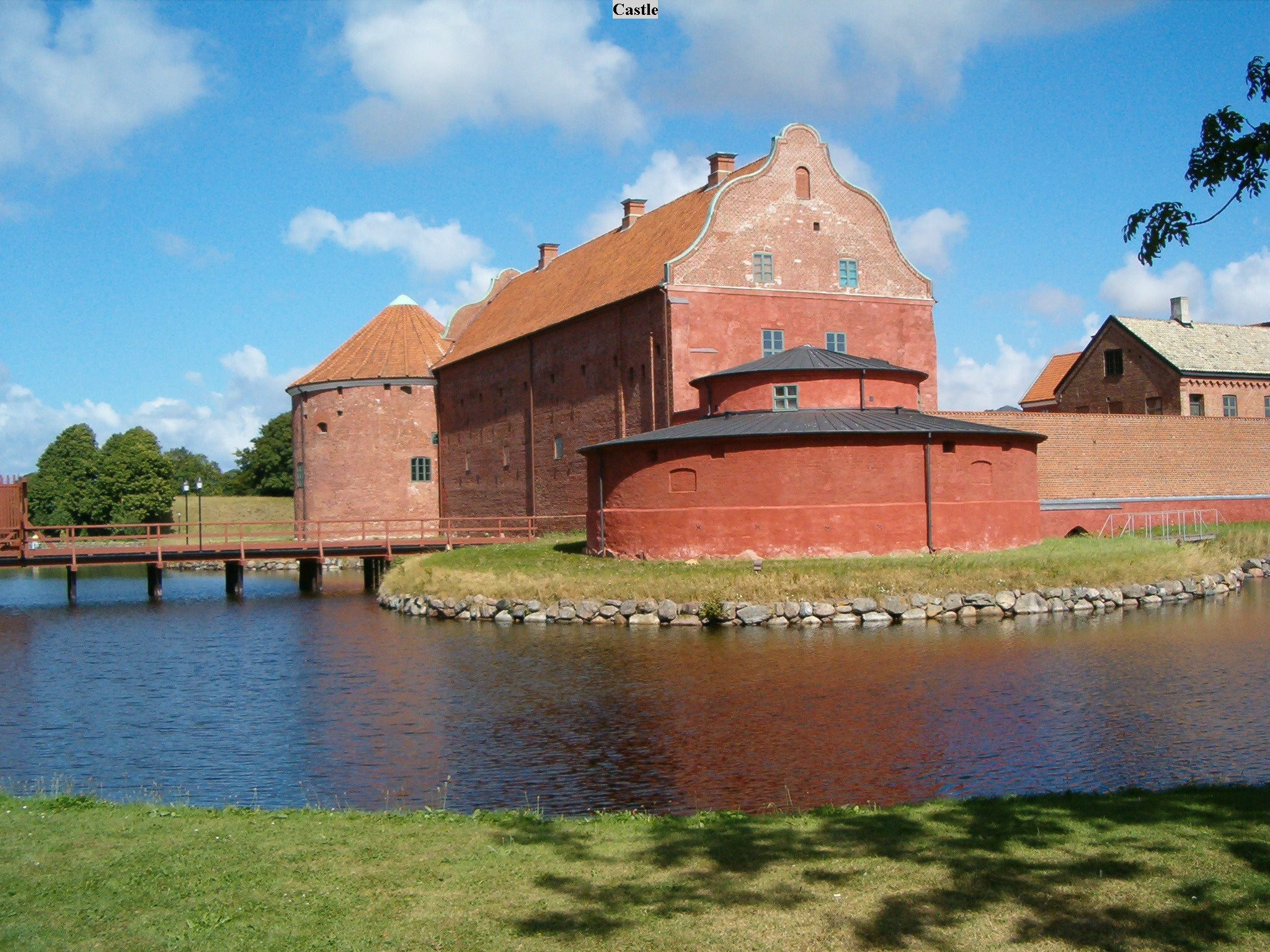 Landskrona Citadel,Sweden